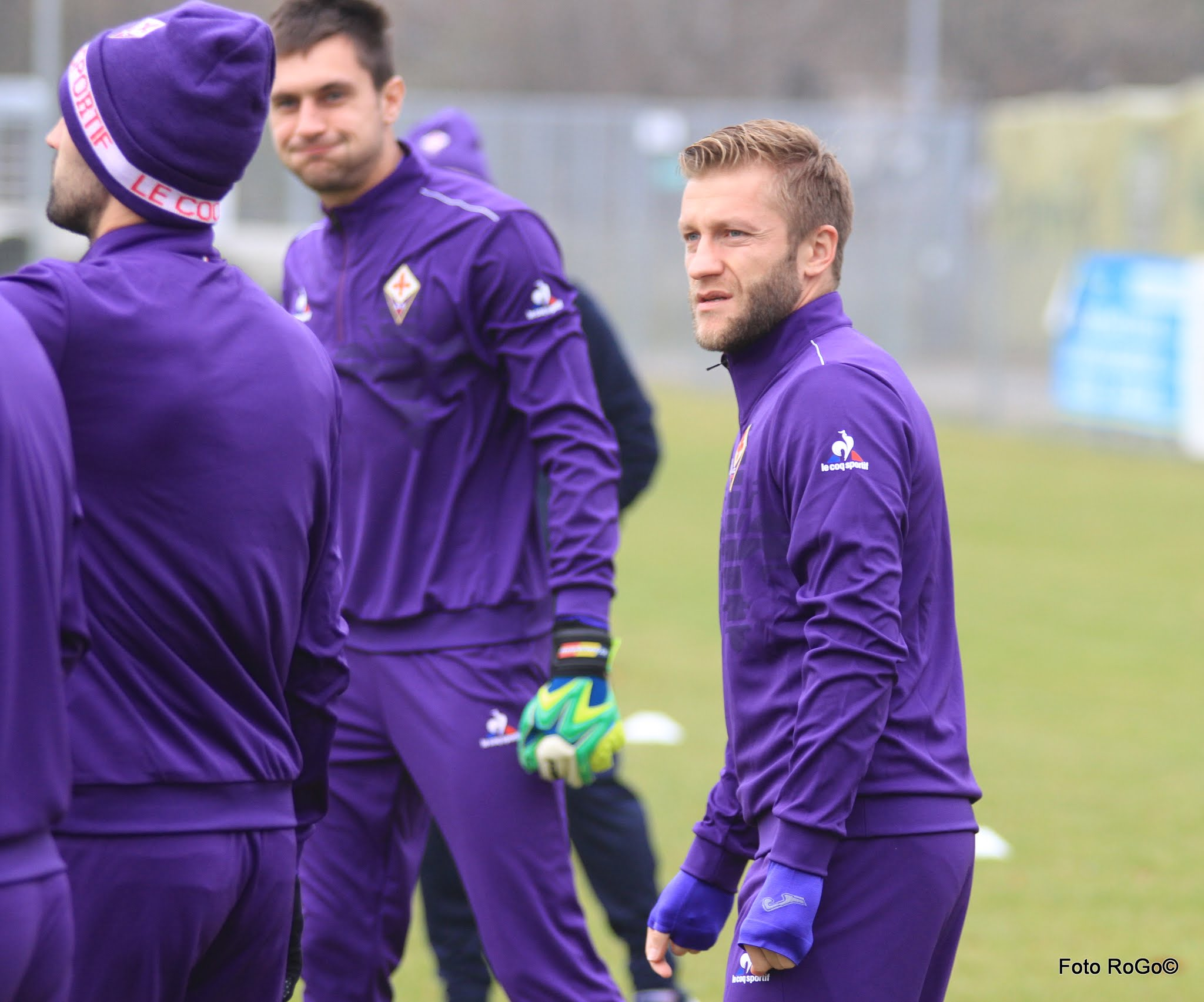 Jakub Błaszczykowski in training with ACF Fiorentina in 2015.